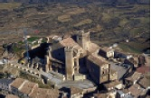 Uxueko Santa Maria